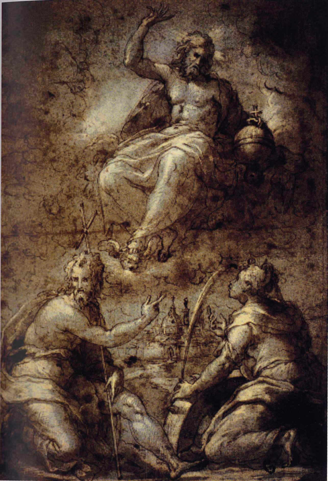 Disegno Preparatorio, Pala Lioni